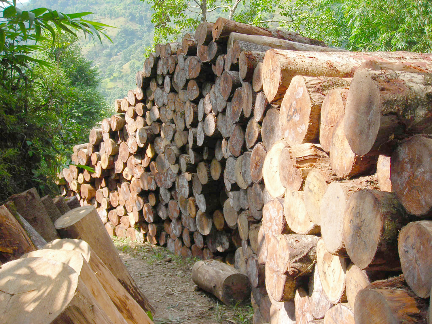 नेपाली: काटिएका रूखका ठूटा